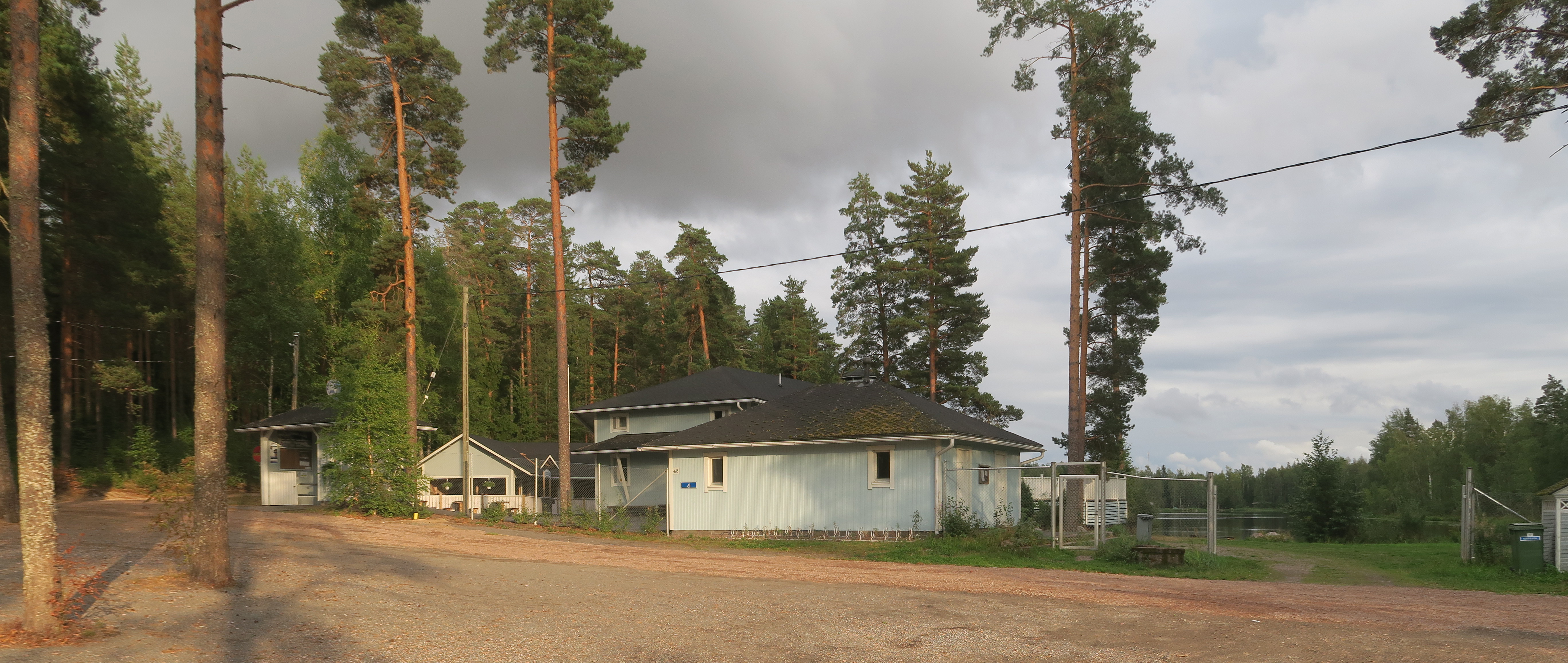 Pappisten lava Loimaalla. Taustalla Pappistenjärvi.